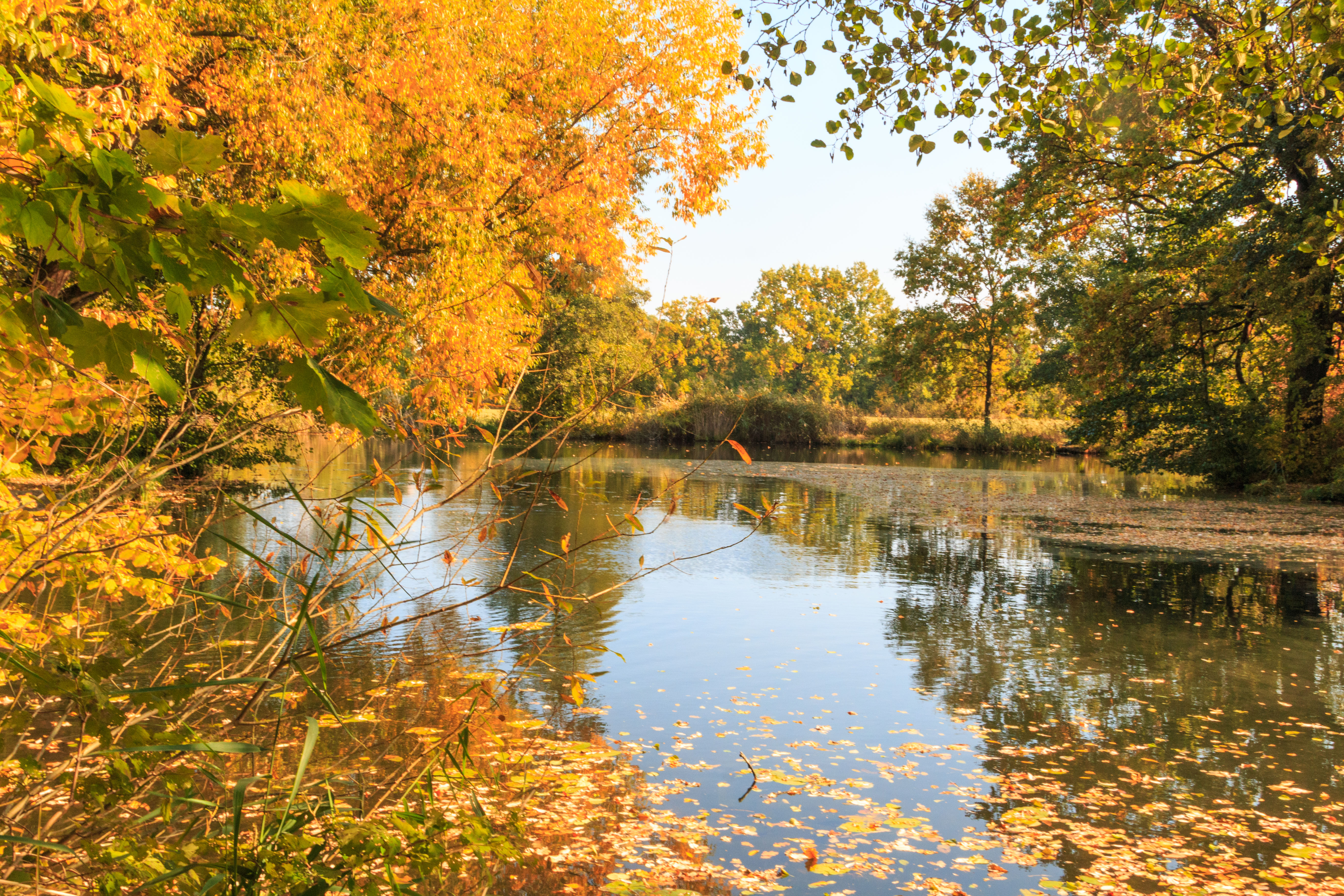 mrtvé rameno Holštejn Project: Vodstvo